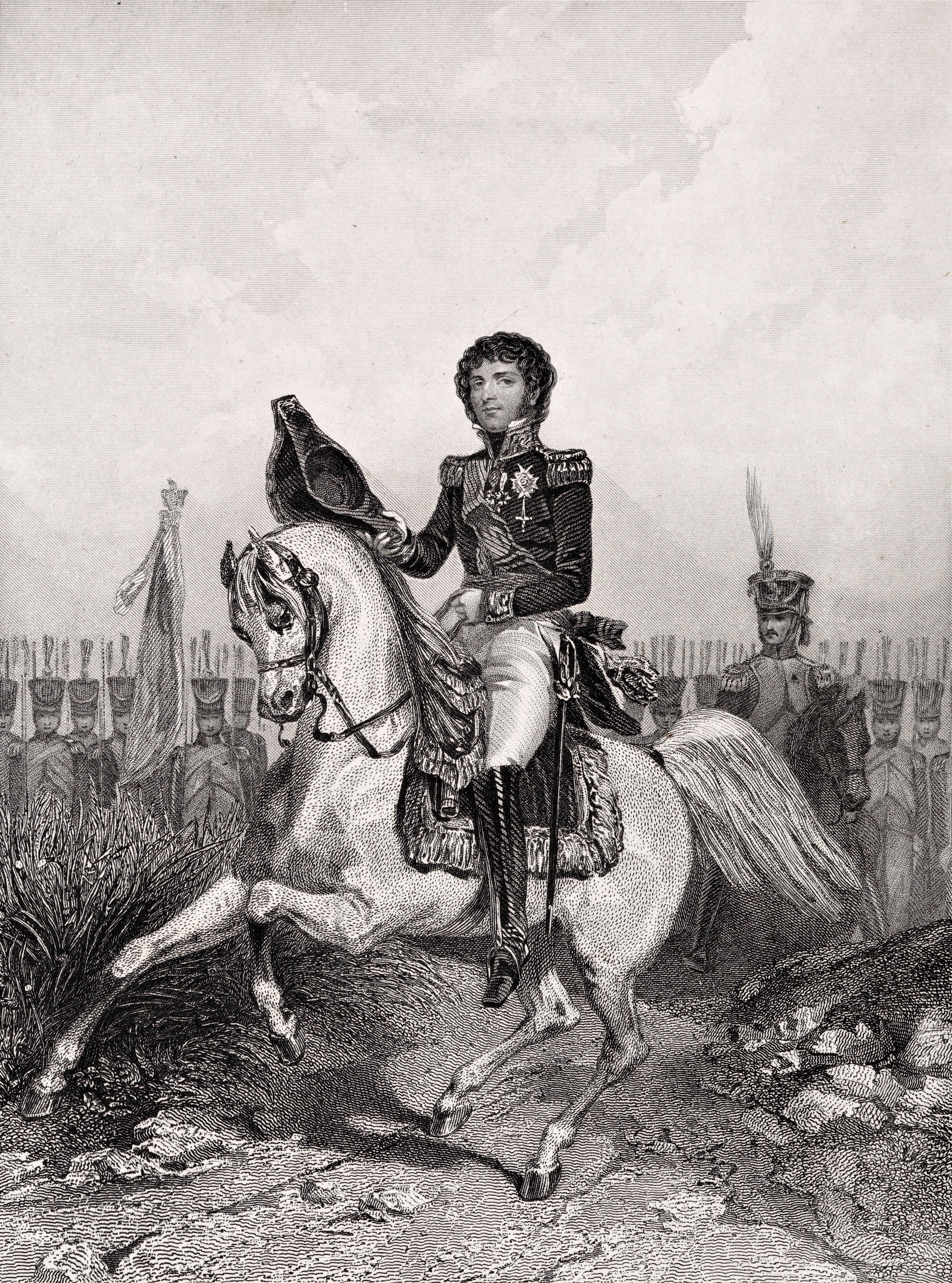 Le maréchal Bernadotte. Lithographie d'Henry Robinson d'après un dessin de L. David, Bibliothèque nationale de Norvège.